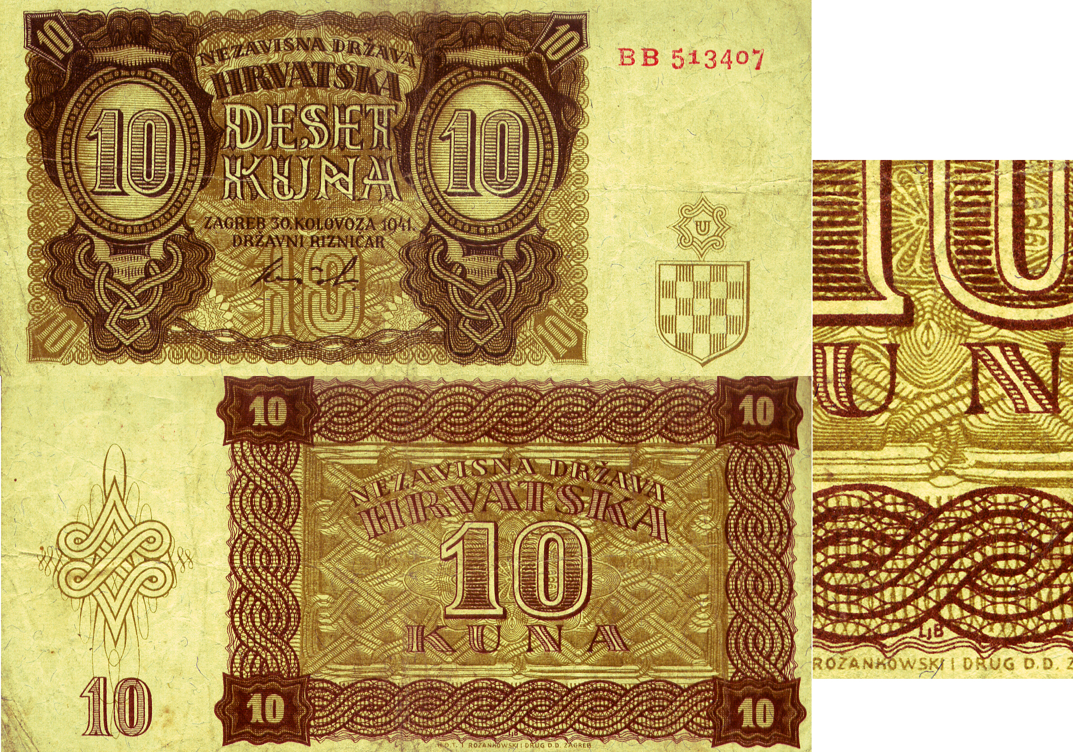 10 kuna iz NDH godina 1941.